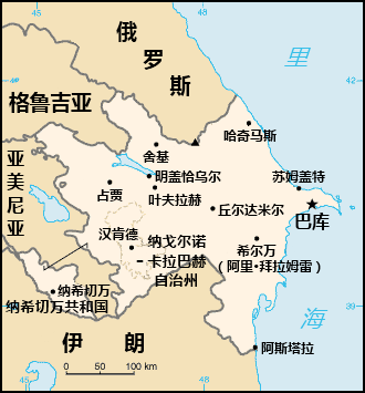 阿塞拜疆地图